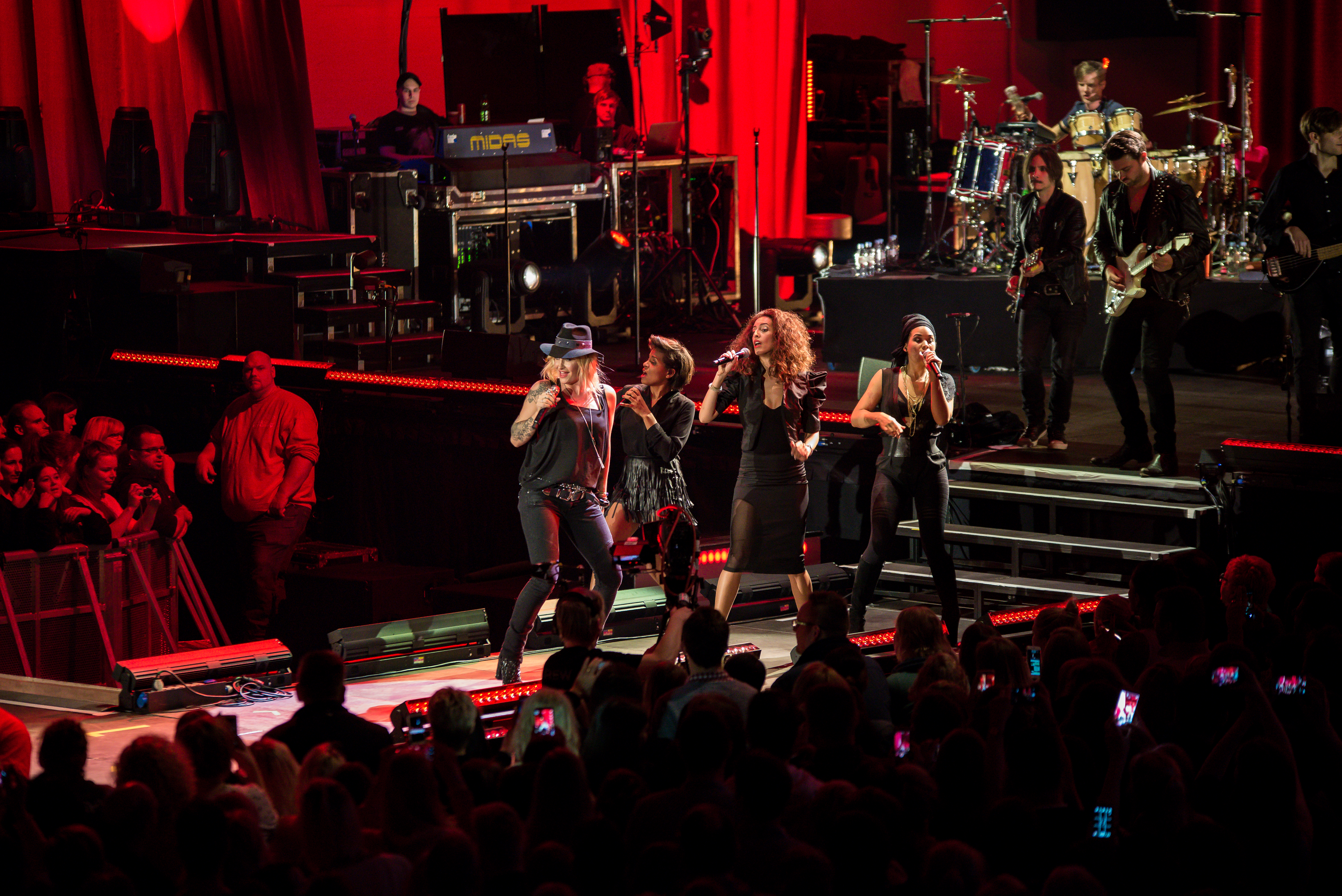 Sarah Connor, Muttersprache Tour Live, Bremen, ÖVB-Arena, 06-03-2016